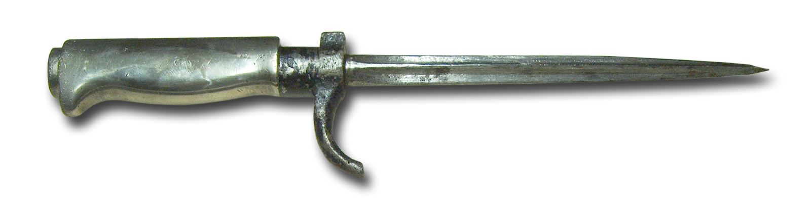 Grabendolch franzoesich / DC4300 Digital Camera